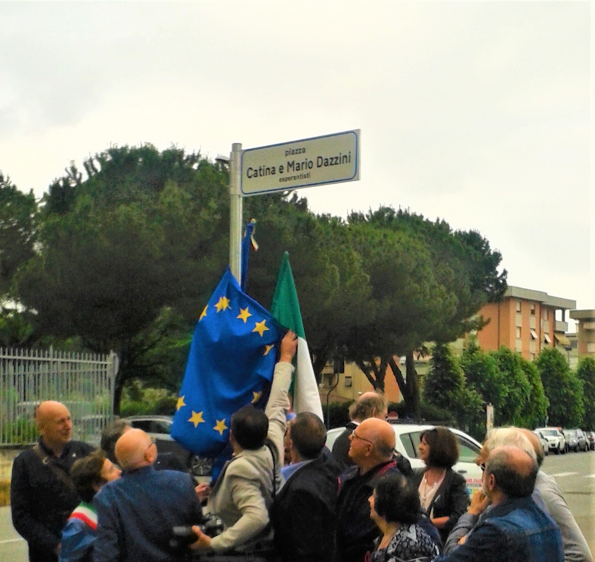 Il 31 di maggio 2018 il Comune di Massa Carrara gli ha intitolato una piazza 'piazza Catina e Mario Dazzini - esperantisti' per ricordare l'attività svolta dagli stessi per la città stessa.